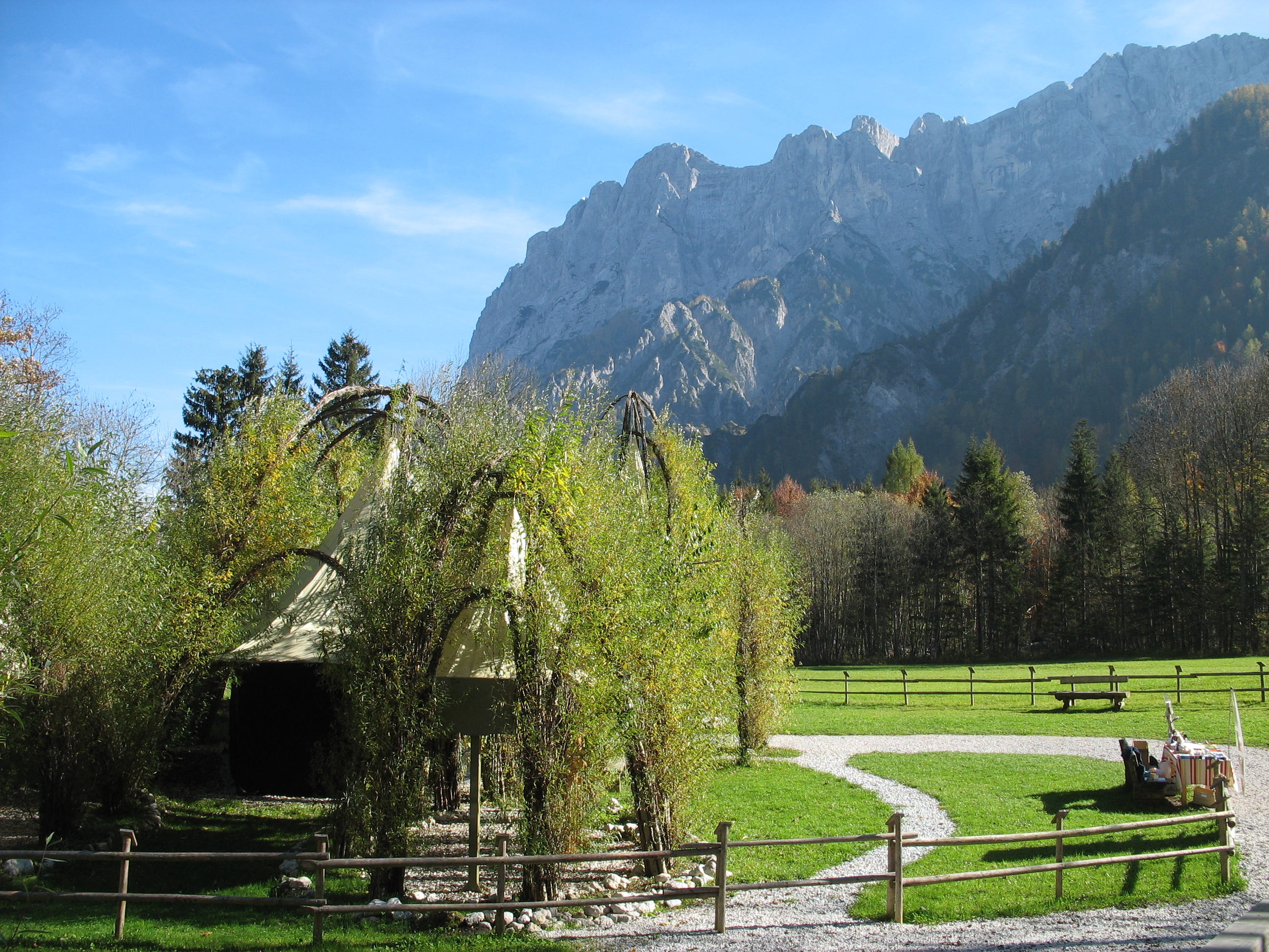 Nationalpark Gesäuse, Steiermark: Weidendom